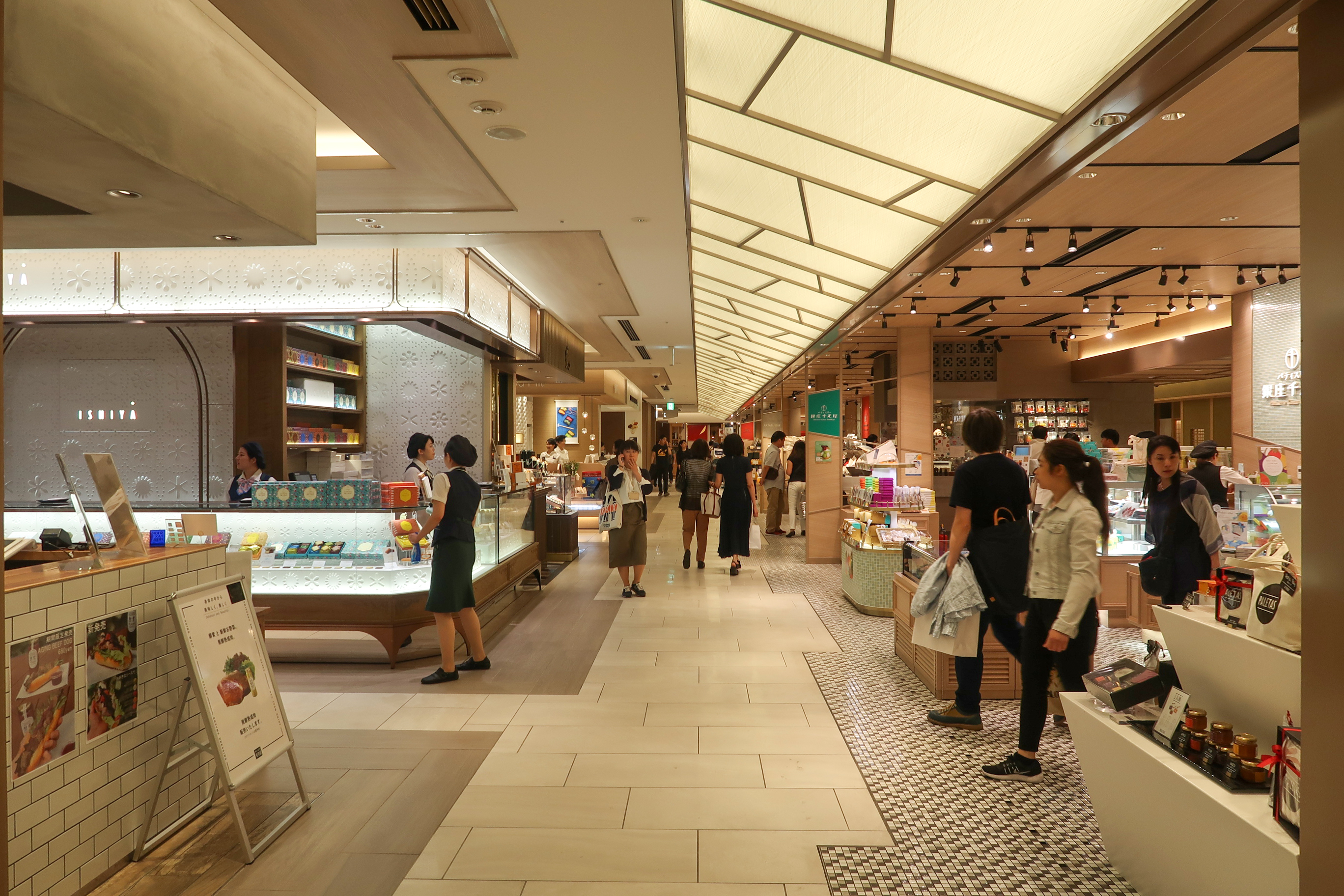 GINZA SIX B2